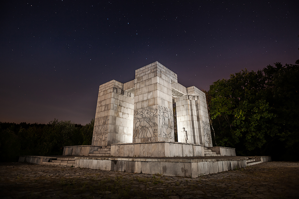 Wybudowany w 1955 r. Pomnik Czynu Powstańczego na Górze Św. Anny. Zdjęcia wykonane w porze nocnej.